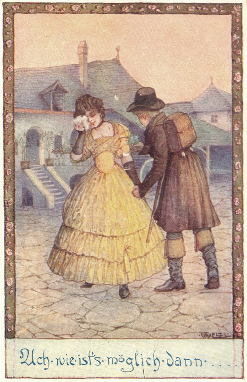 Bildpostkarte Ach wie ists möglich dann